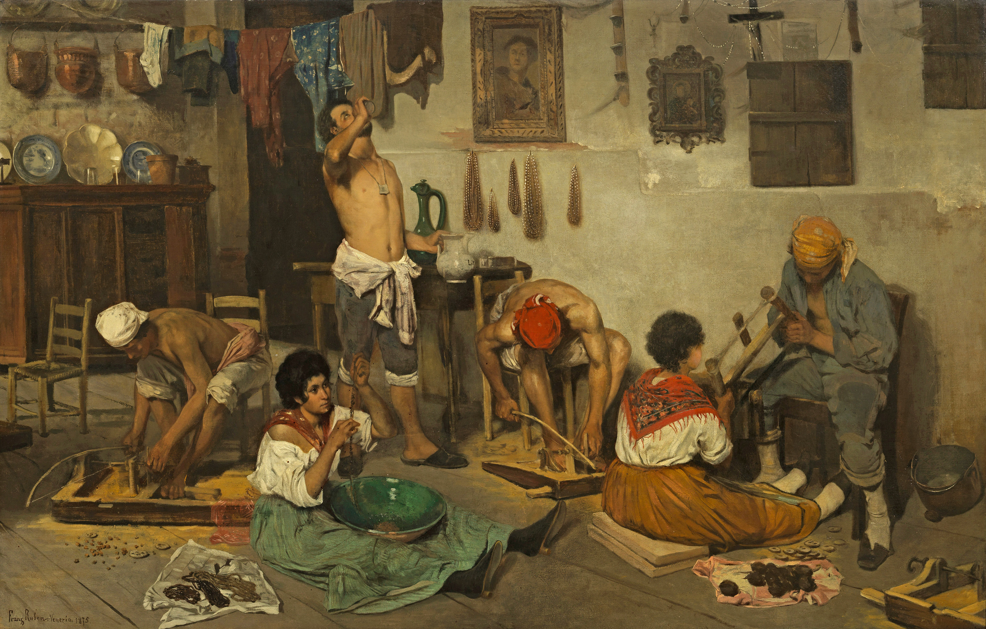 "Venetianische Rosenkranzdrechsler" (Originatitel). Öl auf Leinwand. links unten signiert und datiert 1875 mit Ortsangabe Venezia; 77 cm x 122 cm